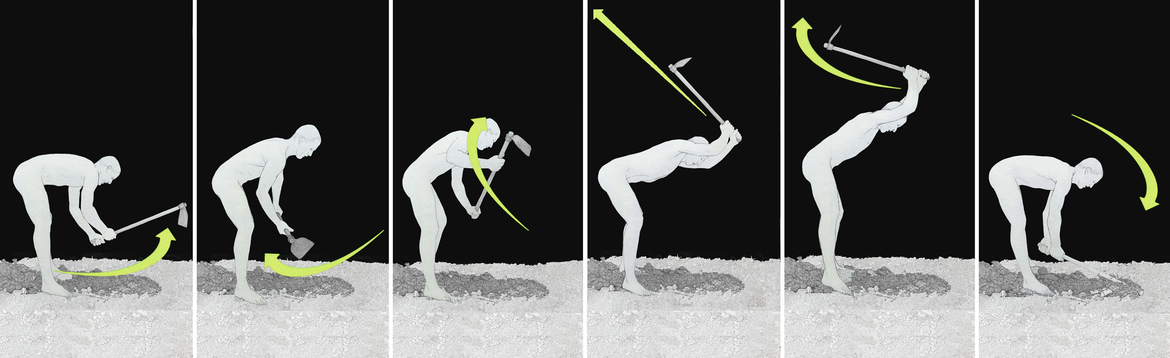 Moviments del llaurador valencià a l'hora de cavar